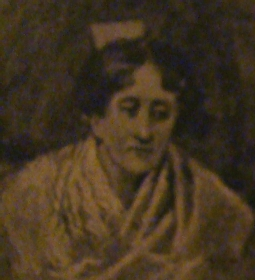 Retrato de Mercedes Lasala de Riglos (1763-1837)